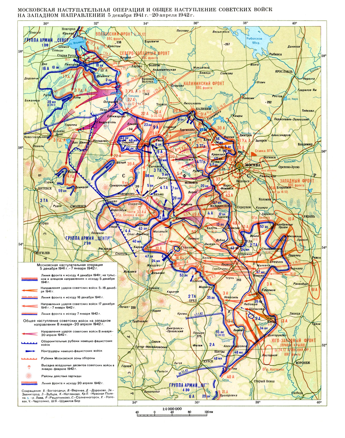 Контрнаступление советских войск под Москвой (1941)